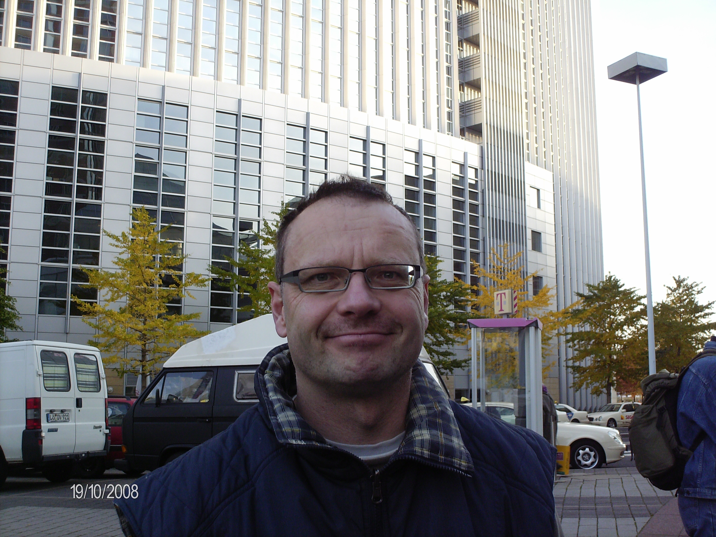 Christian T. Petersen auf der Frankfurter Buchmesse 2008